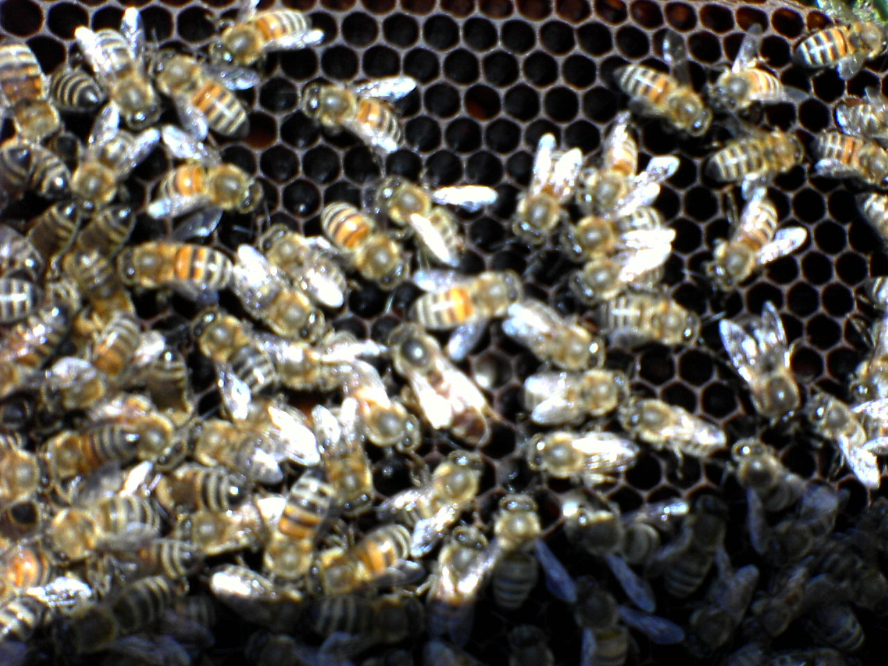 vasilisa Melises2